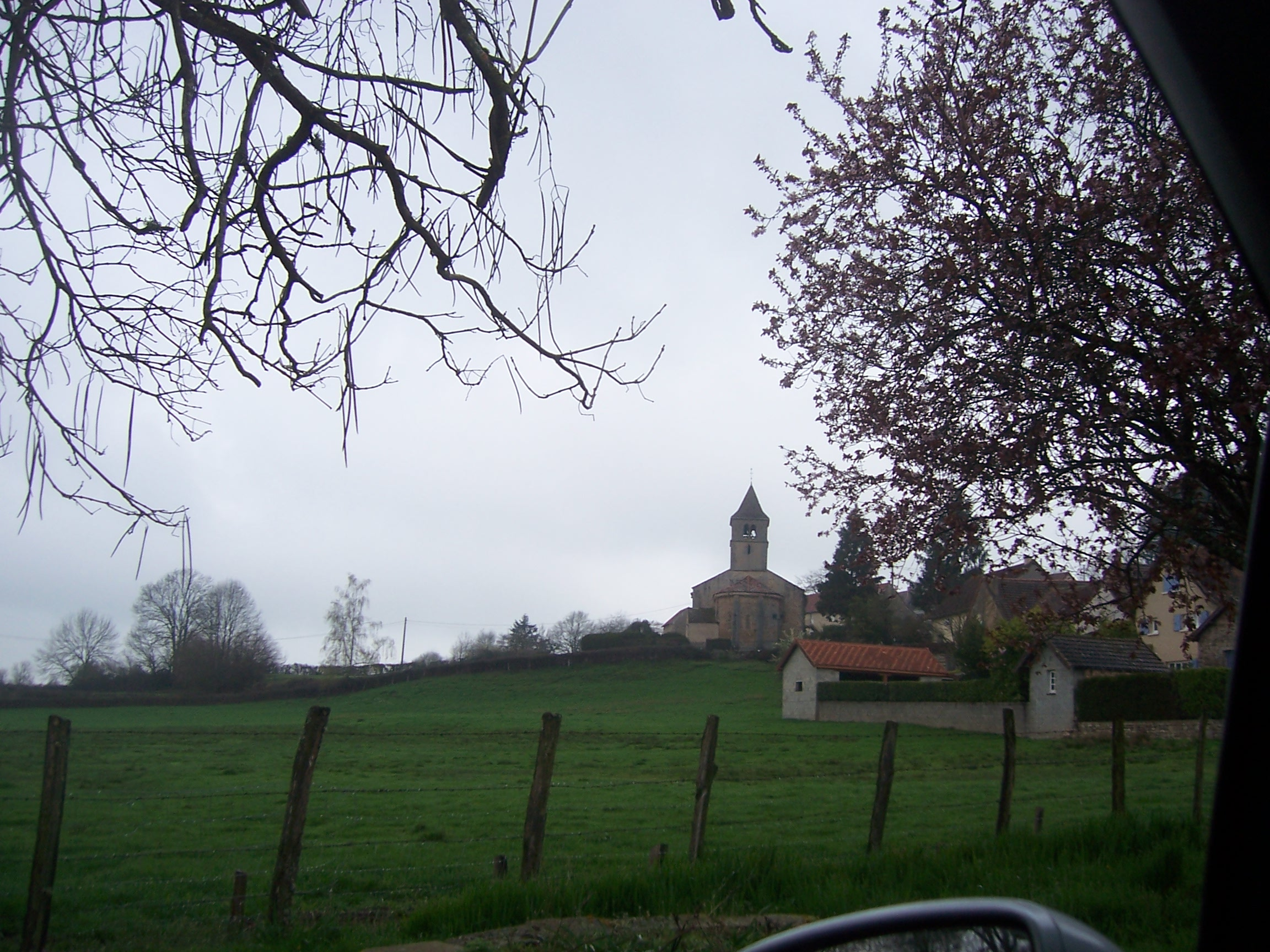 Baron (Saône-et-Loire)